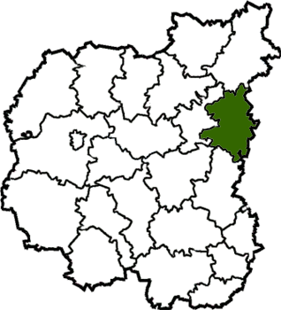 Koropskyi-Raion map